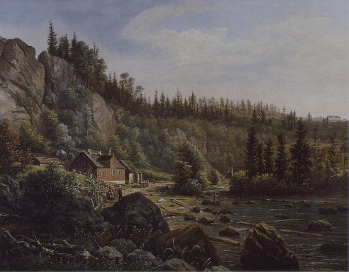 Maleriet «Parti af Tistedalen i Norge», med Veden gård i bakgrunnen